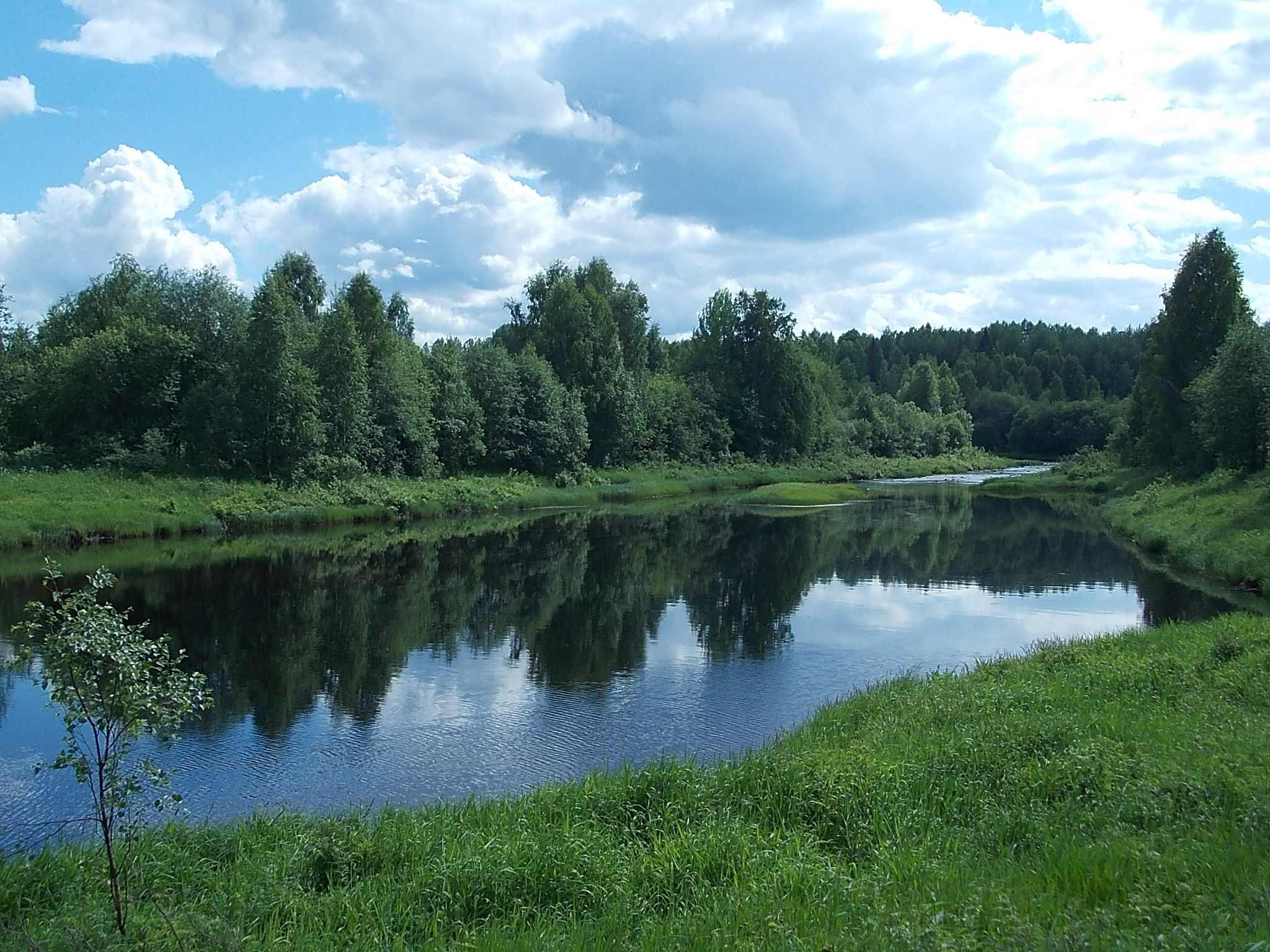 Река Таржеполка